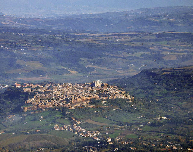 Vue d'avion d'Orvieto le en Novembre 2008